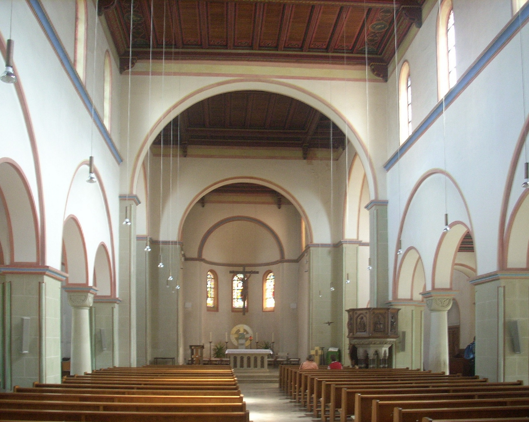 Wolfenbüttel, kath. Kirche St. Petrus, Inneres